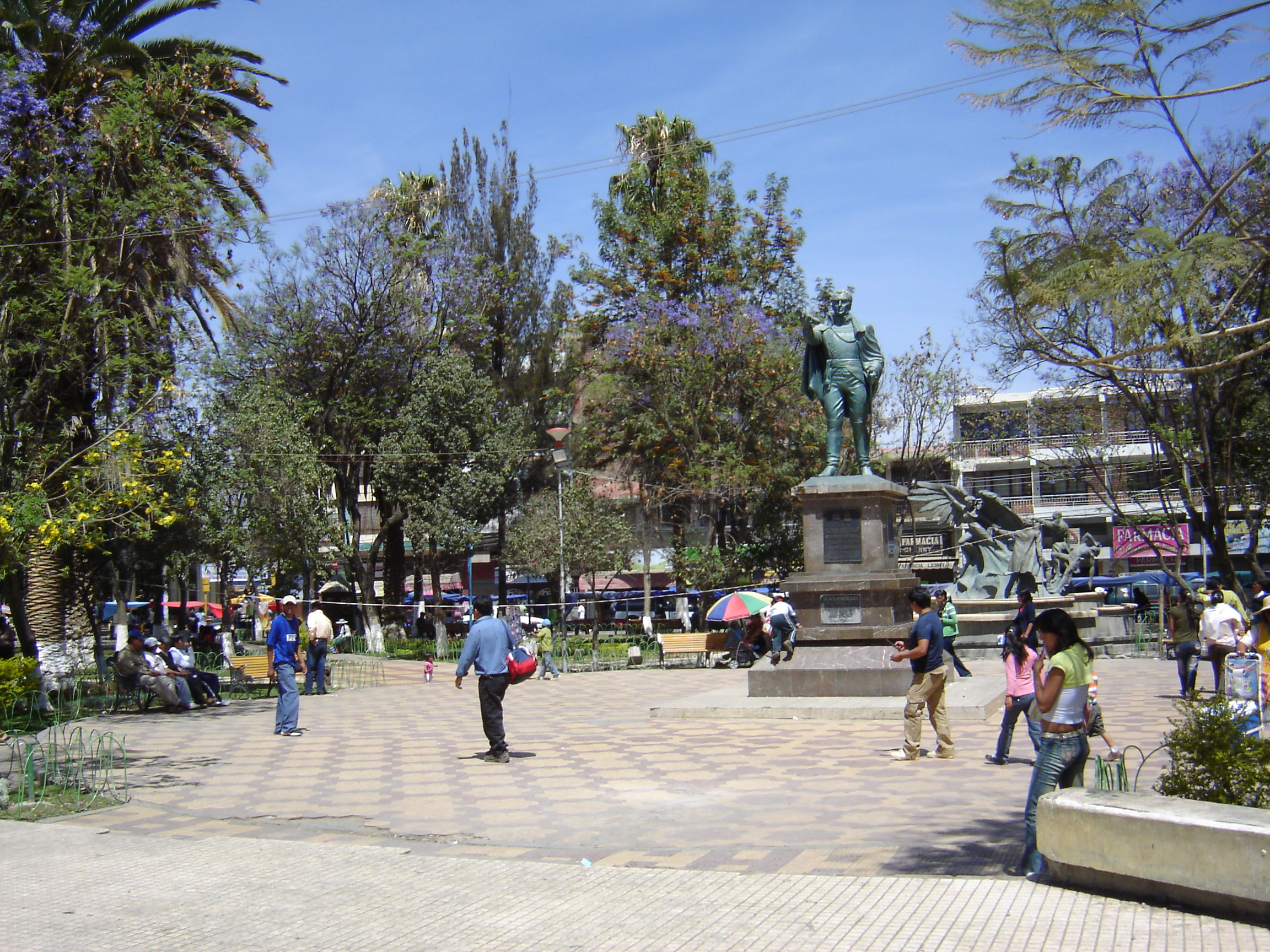 Vista de la Plaza Bolivar, al centro con el monumento al Libertador Simon Bolivar Runa Simi: Juq qhawariy Bolivar kanchamanta, chawpinpi Qhispiq Simon Bolivarpa lantin.